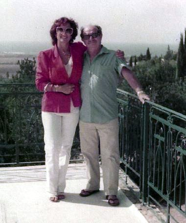 he:חיים חפר וhe:רחל הרמתי על גג ביתו של חיים חפר בעין הוד